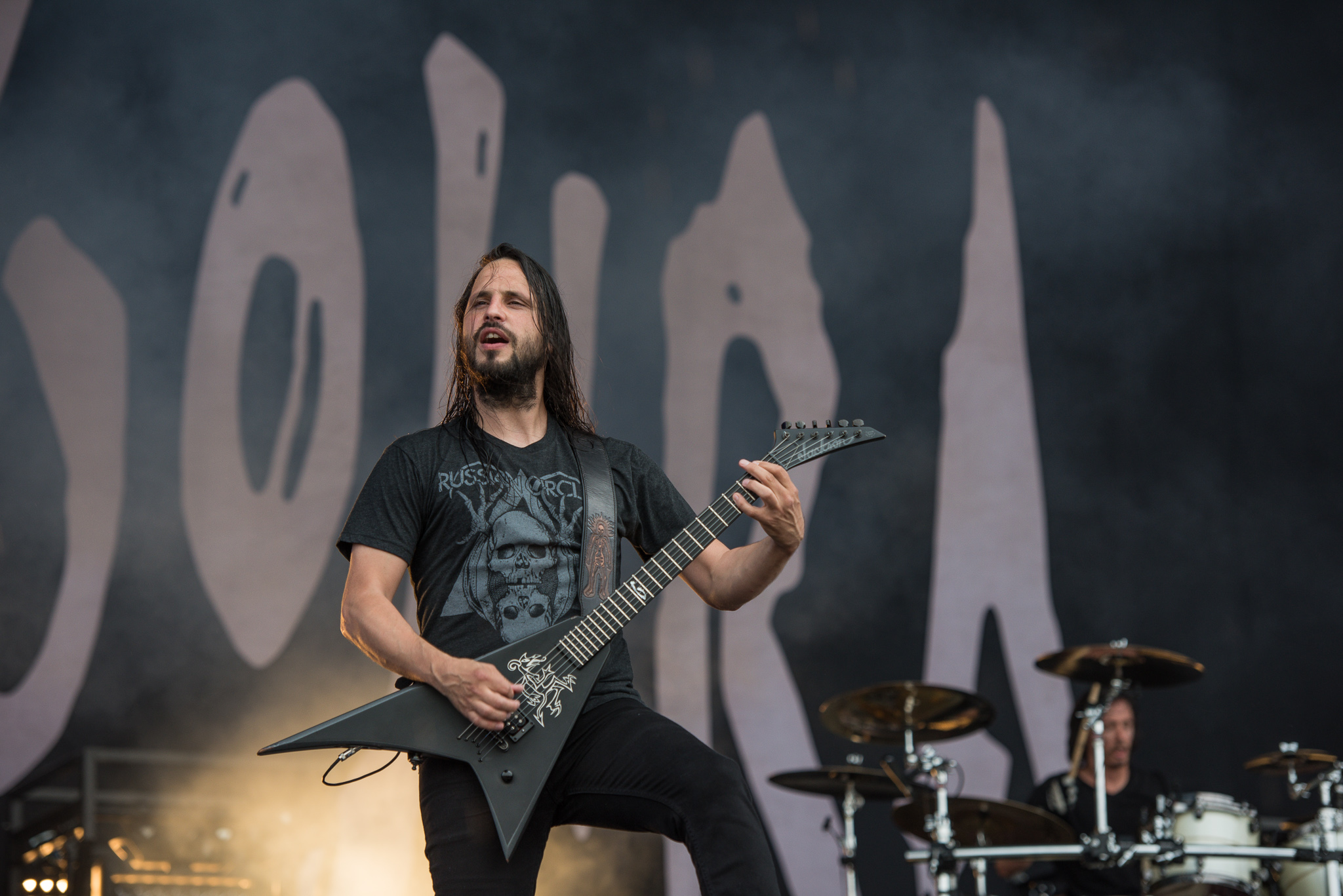 ARGO-Konzerte,Christian Andreu,Gojira,Konzert,Livekonzert,Livemusik,Mario Duplantier,Musik,RiP,Rock im Park 2017,Zeppelin Stage